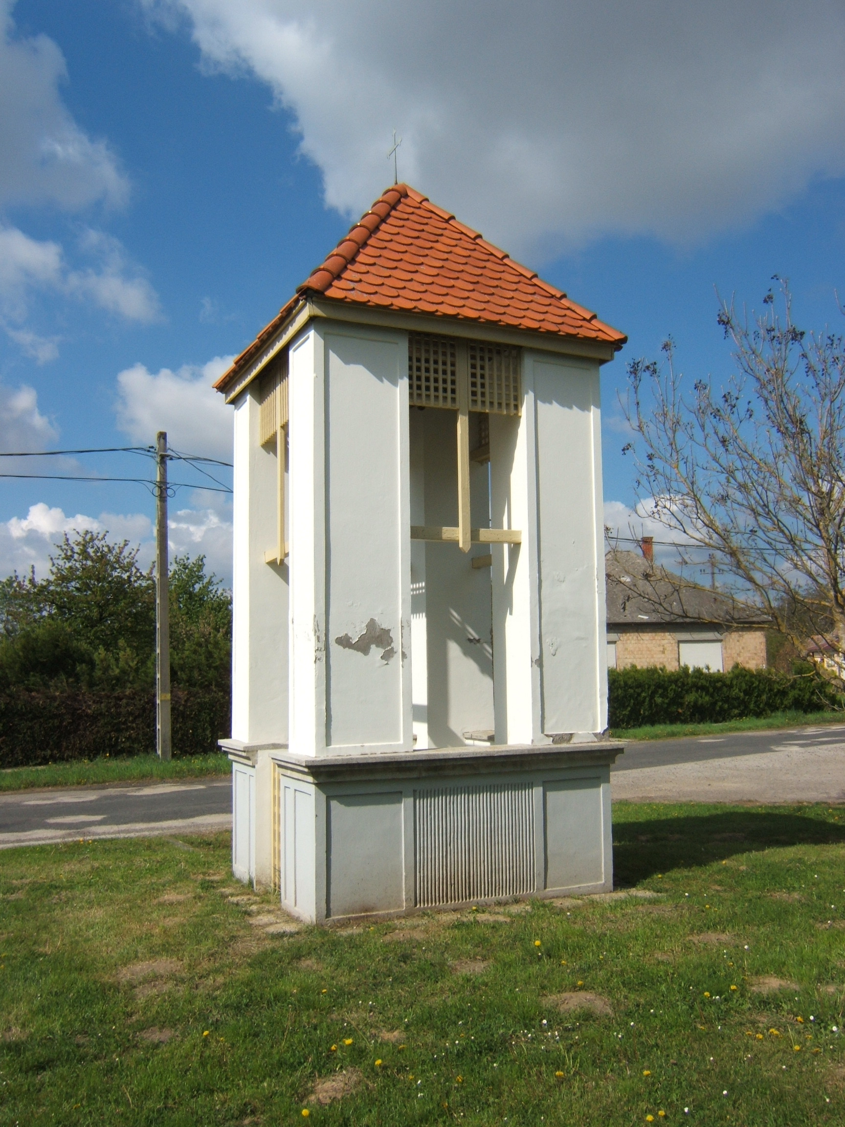 Bodrog, harangláb